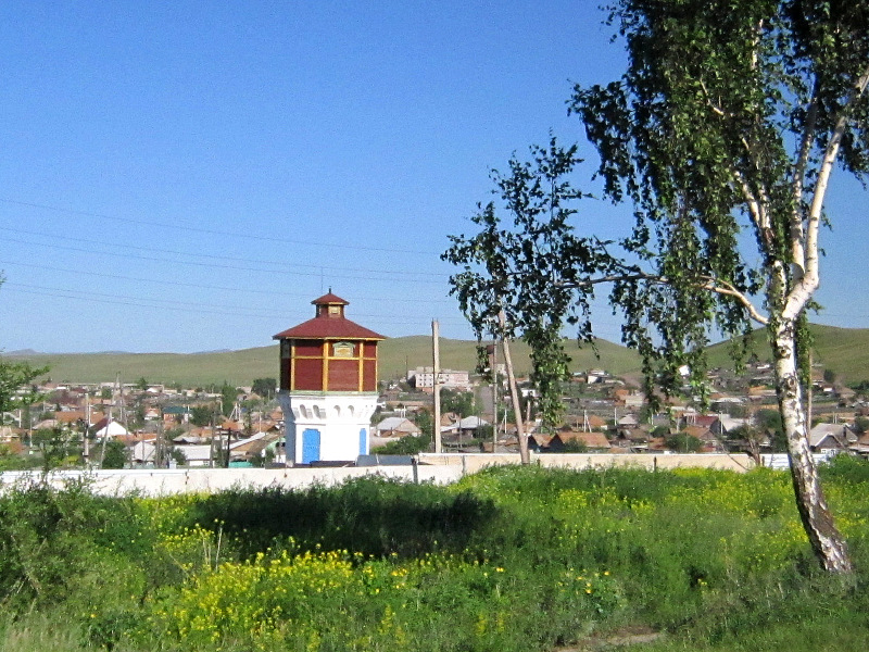 Водонапорная башня станции Шира. Хакасия.